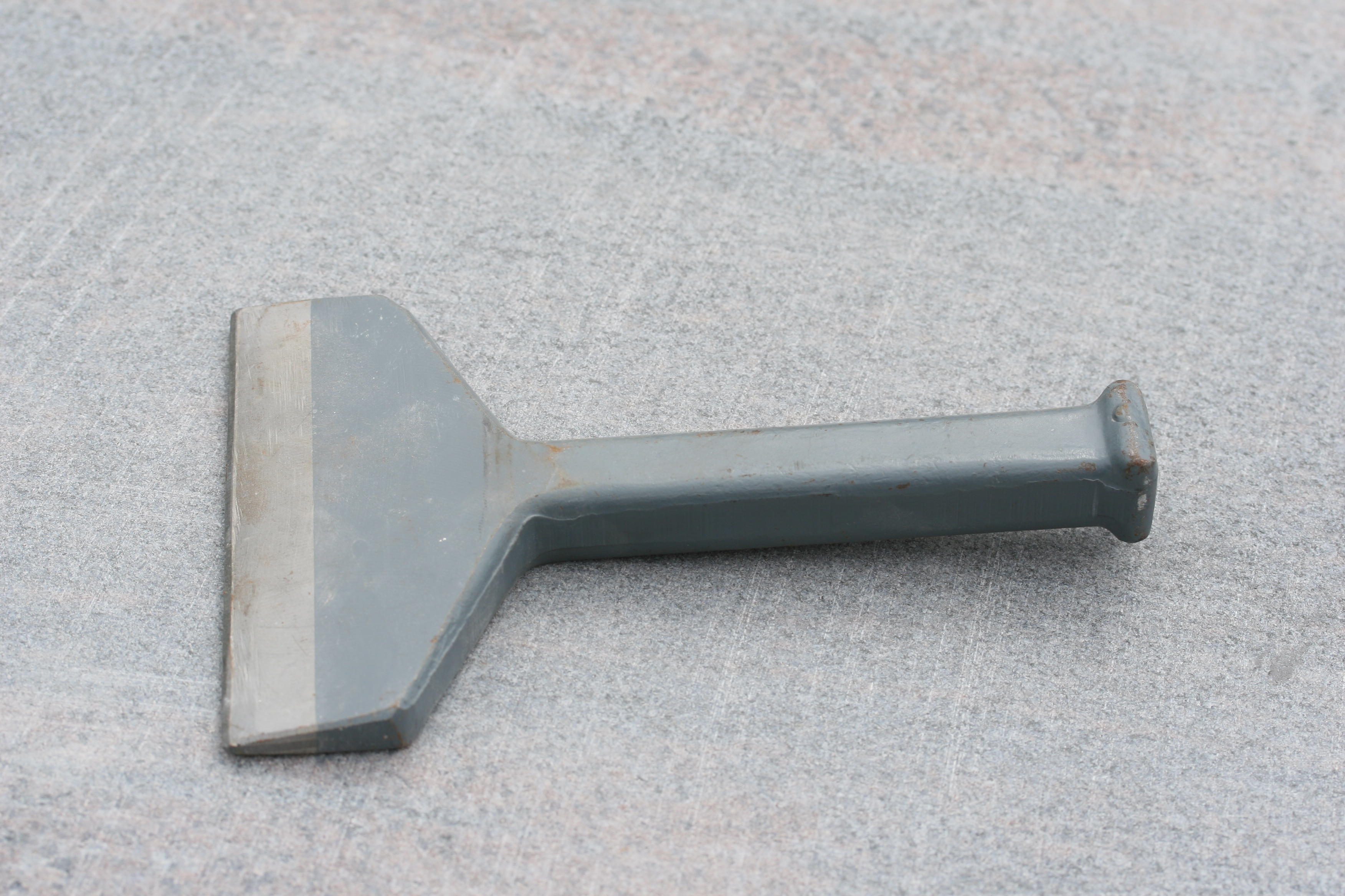 Scharriereisen